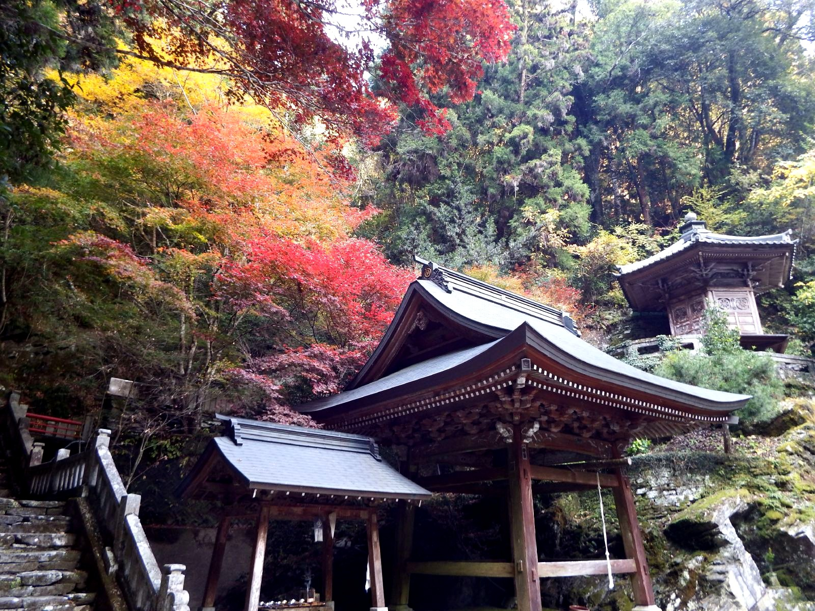 仙龍寺の境内